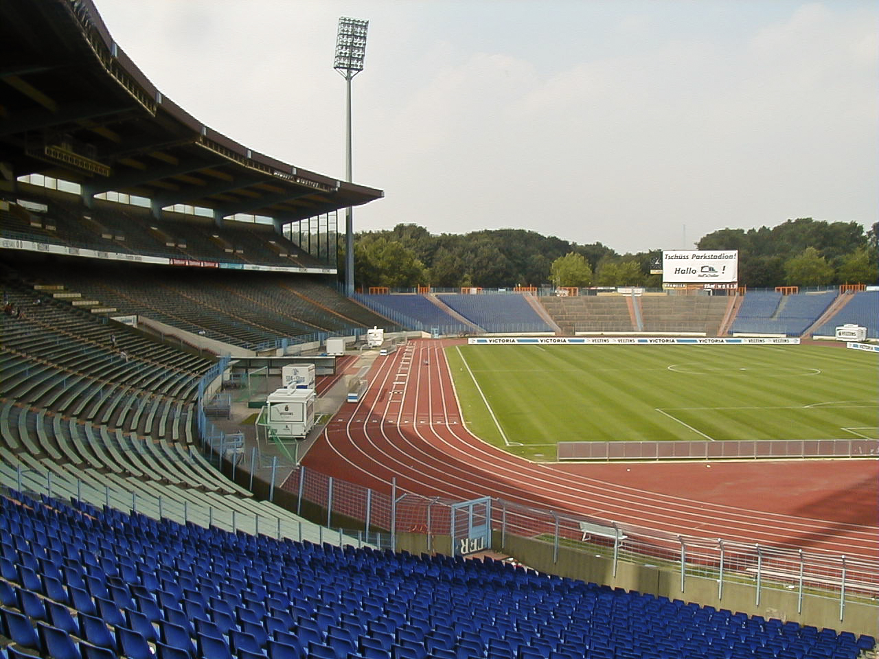 Parkstadion, Gelsenkirchen, Deutschland